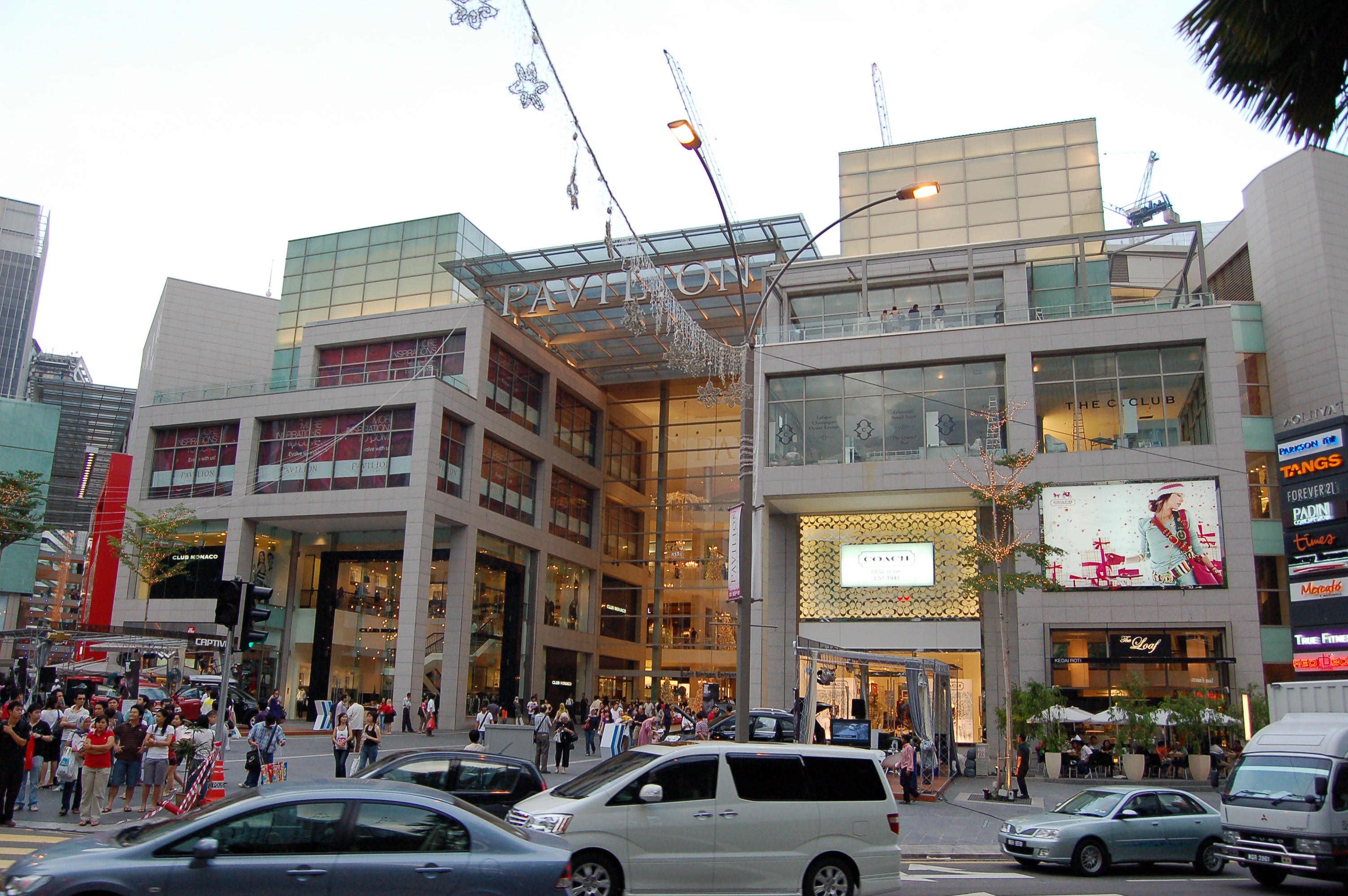 Pavilion KL.jpg